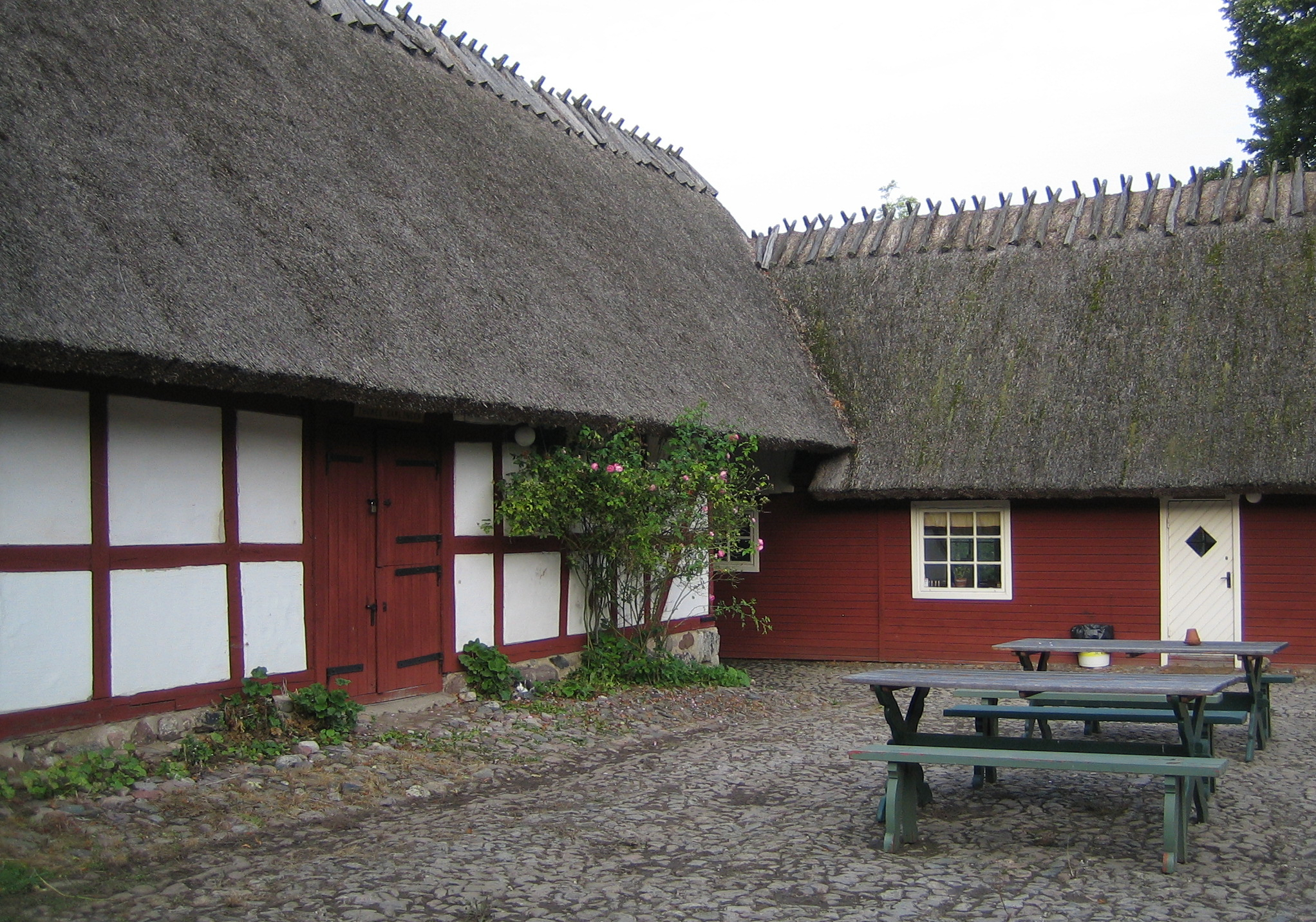 Wowragården, Södra Sallerup, Malmö, Sweden